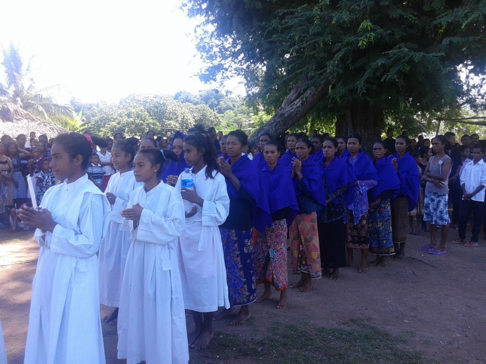 Atabae